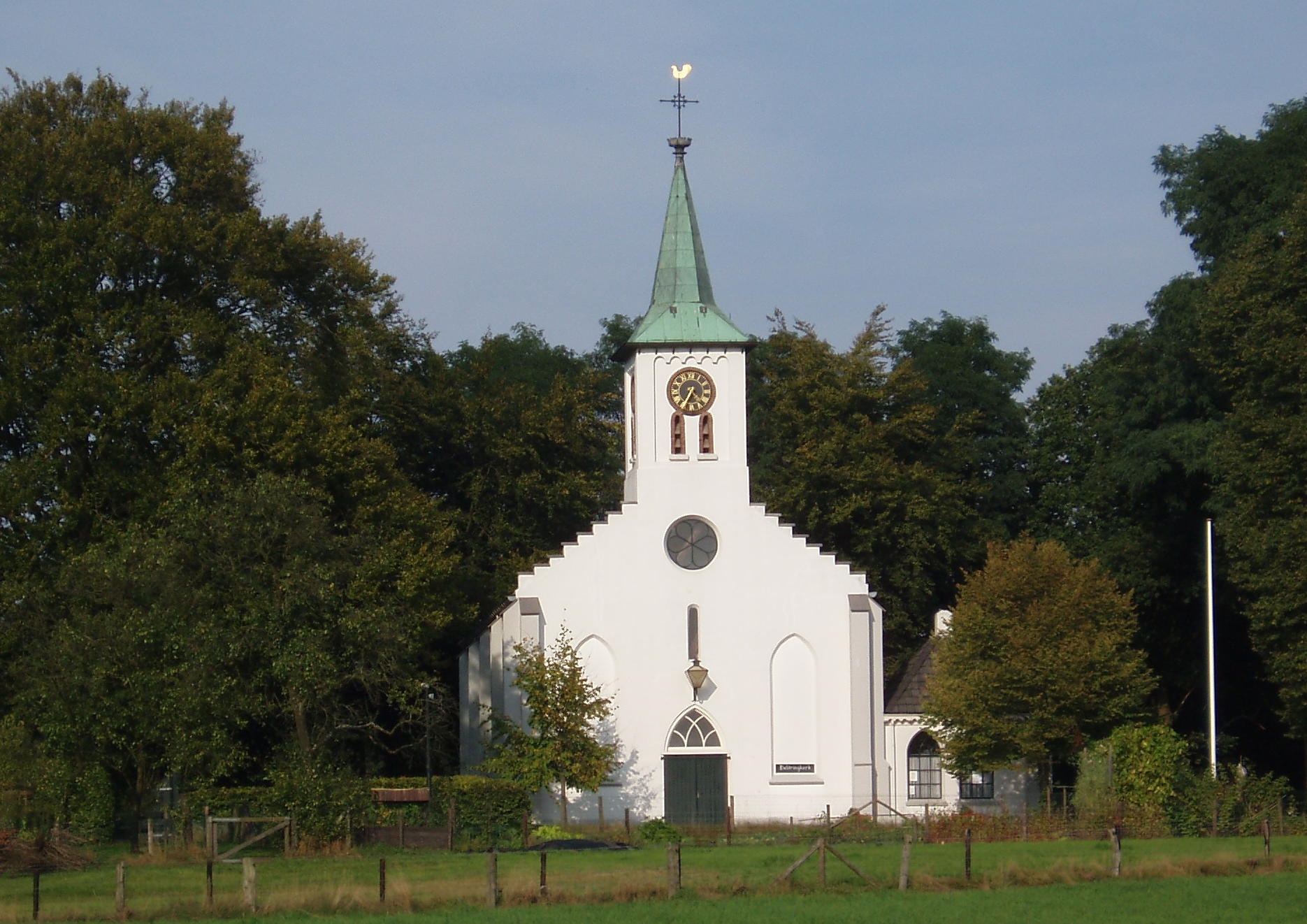 De Heldringkerk in Hoenderloo, gezien vanaf de Middenweg.